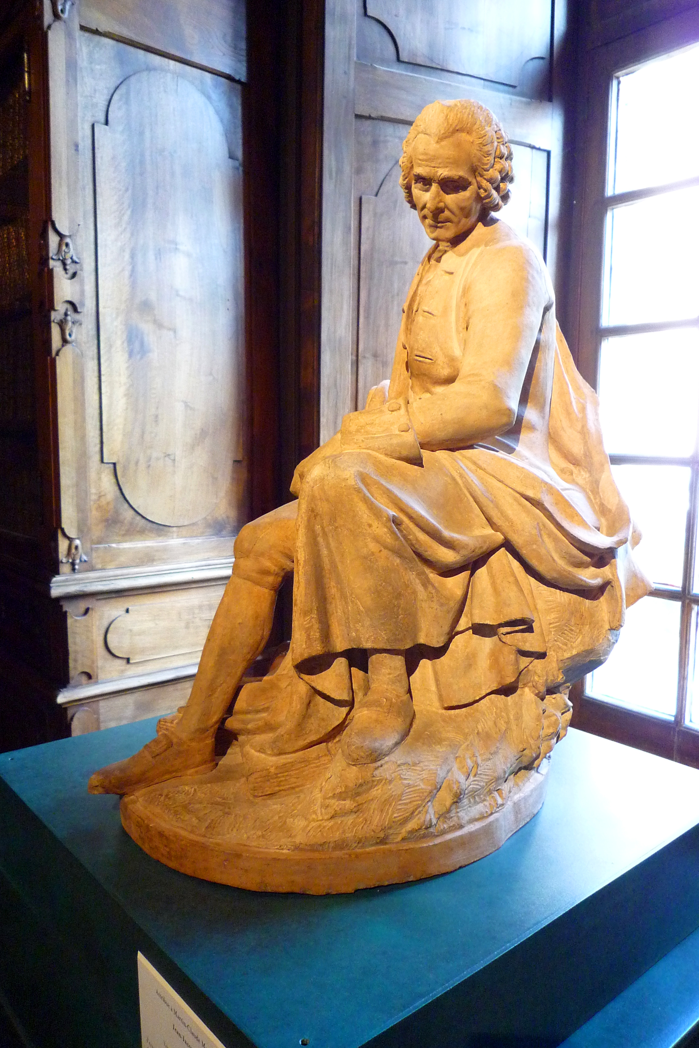 Jean-Jacques Rousseau réfléchissant sur son contrat social, terre cuite, 1790, attribué à Martin-Claude Monot.